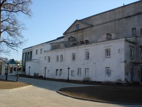 Юго-восточный флигель усадьбы Ваньковичей